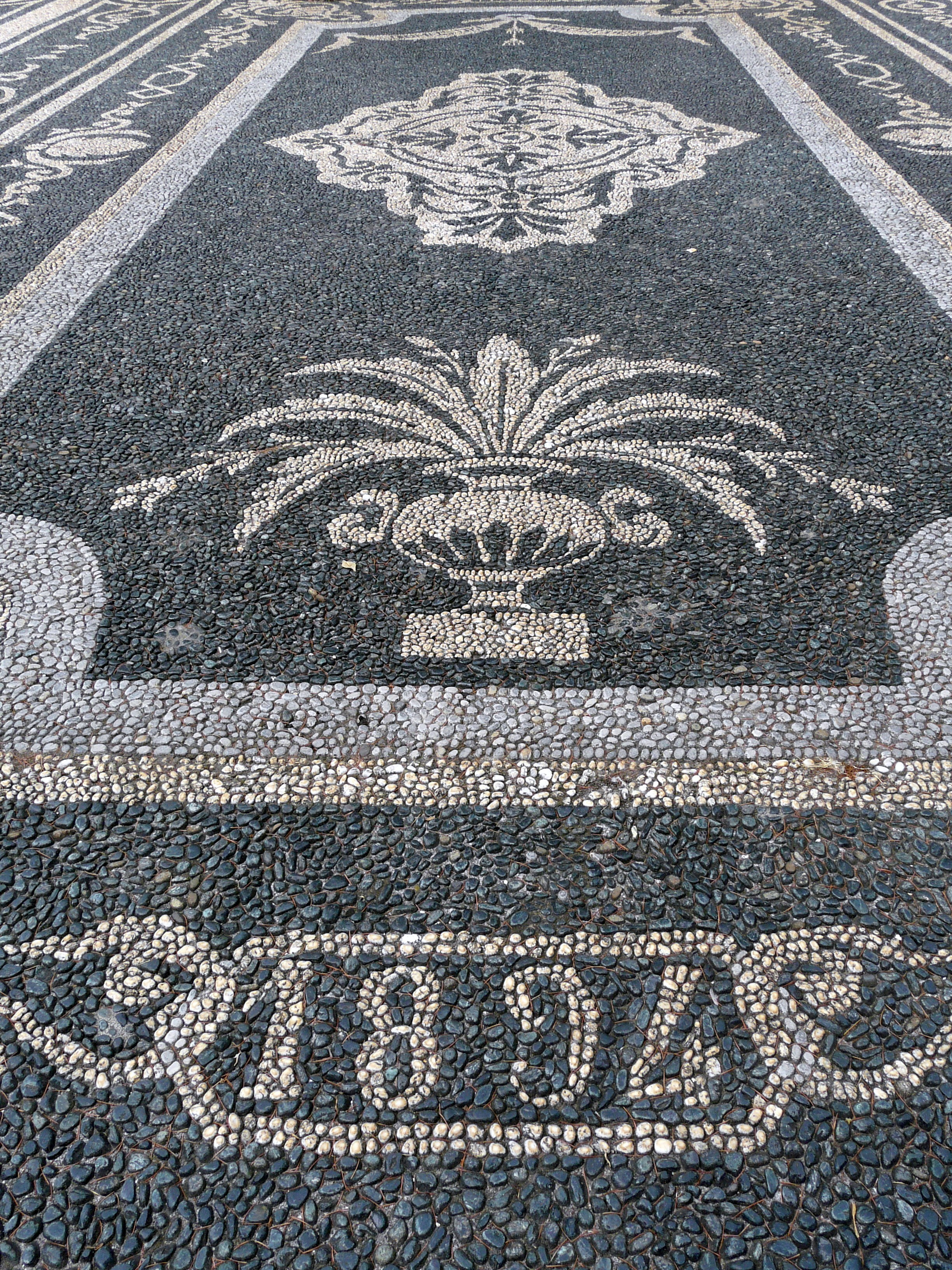 Sagrato della chiesa di San Michele, Celle Ligure, Liguria, Italia